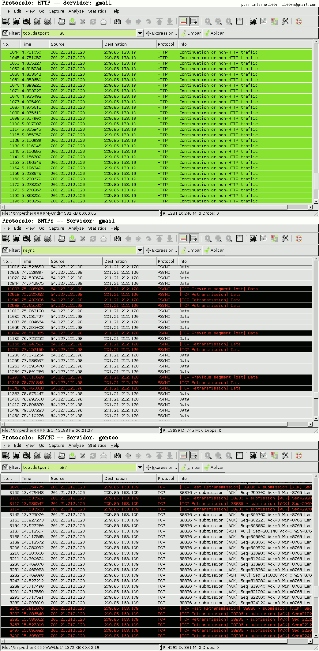 Packet Injection utilizada no Virtua